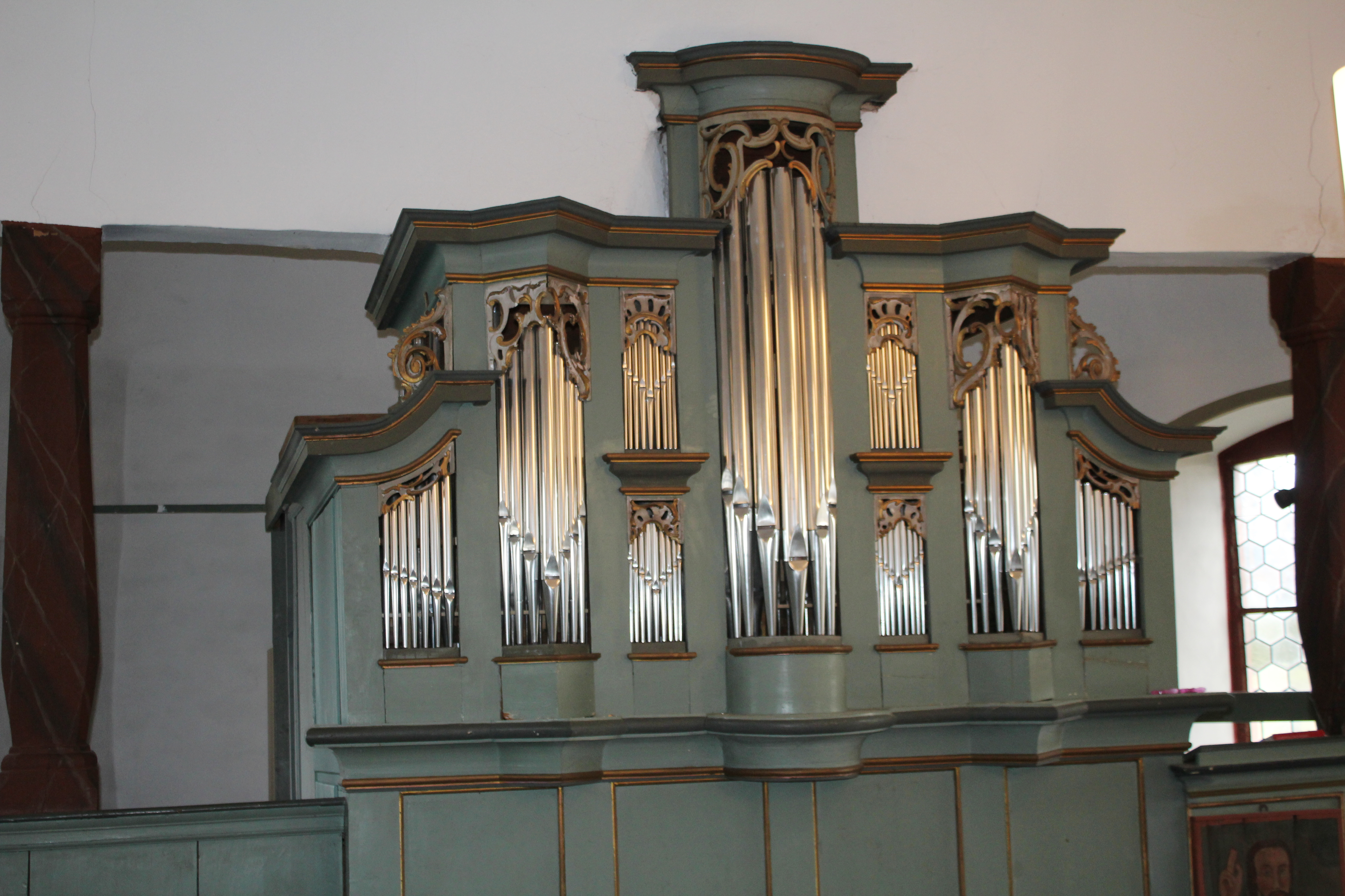 Evangelische Kirche Groß-Eichen, Gemeinde Mücke, Vogelsbergkreis, Hessen, Deutschland